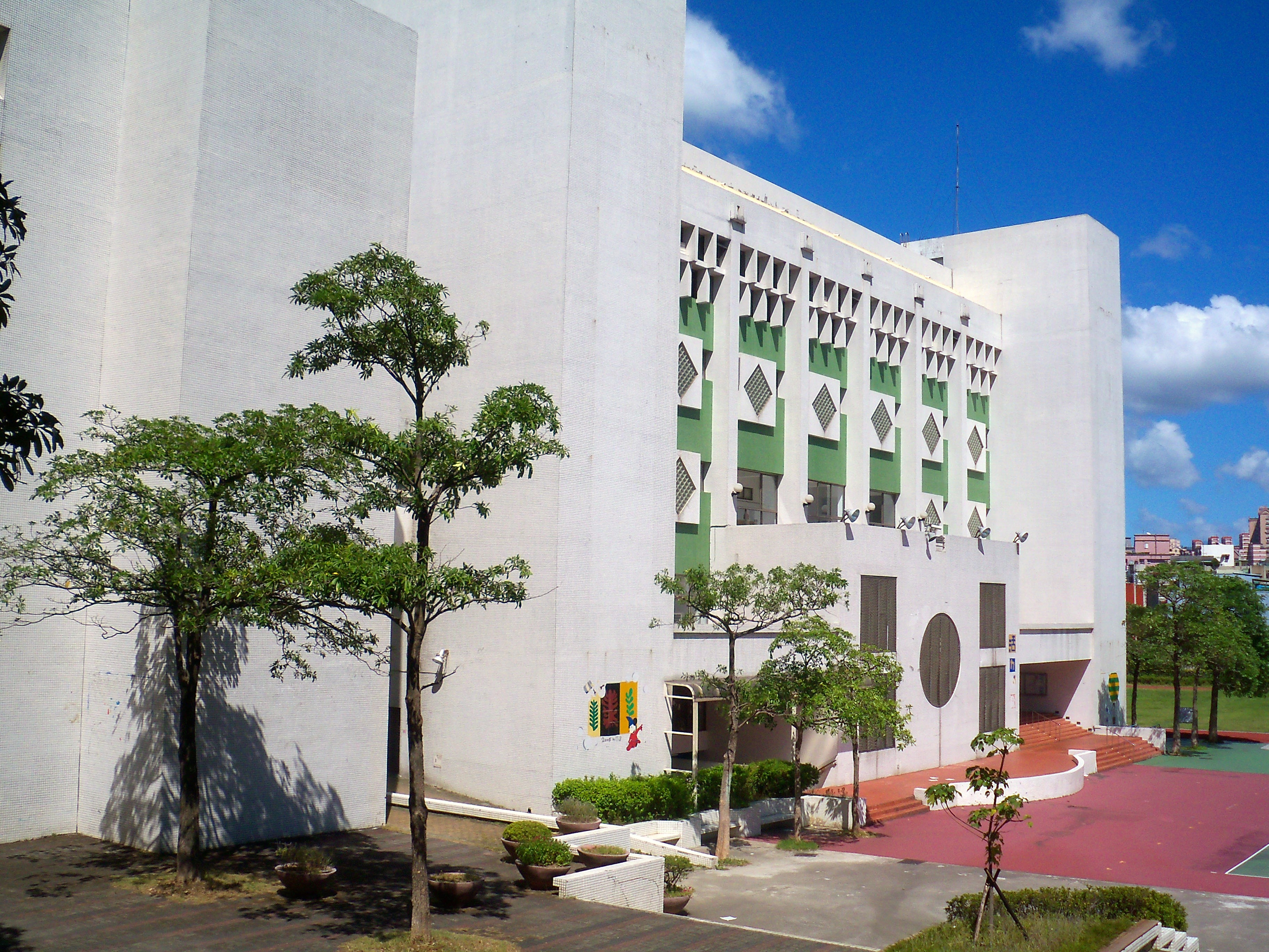 台北市立内湖高級中学活動センター。